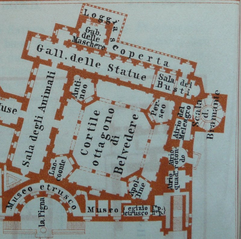 Karl Baedeker: L'Italie des Alpes à Naples. 2e éd. Leipzig 1905. Map of Museo Vaticano, detail: Cortile ottagono del Belvedere